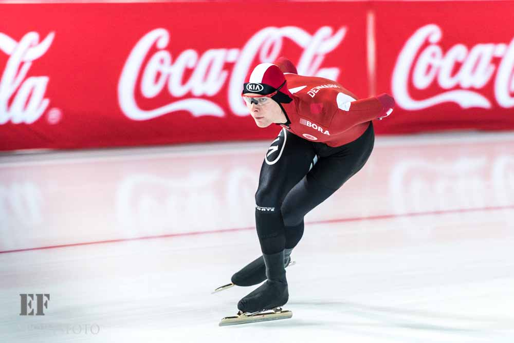 Stafan in Vikingskipet Hamar